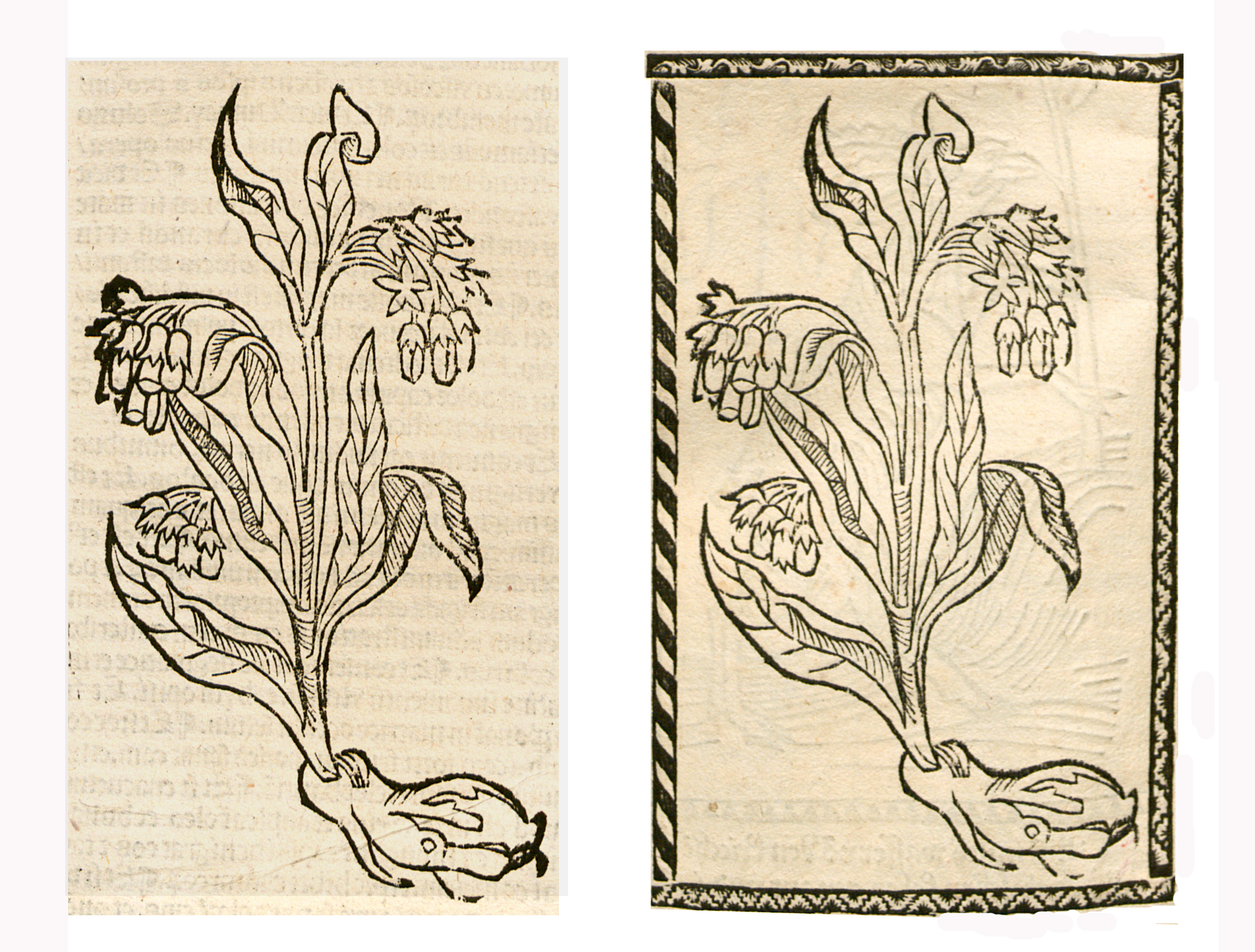 Abbildung von: Güldin Gunsel (Ajuga reptans)